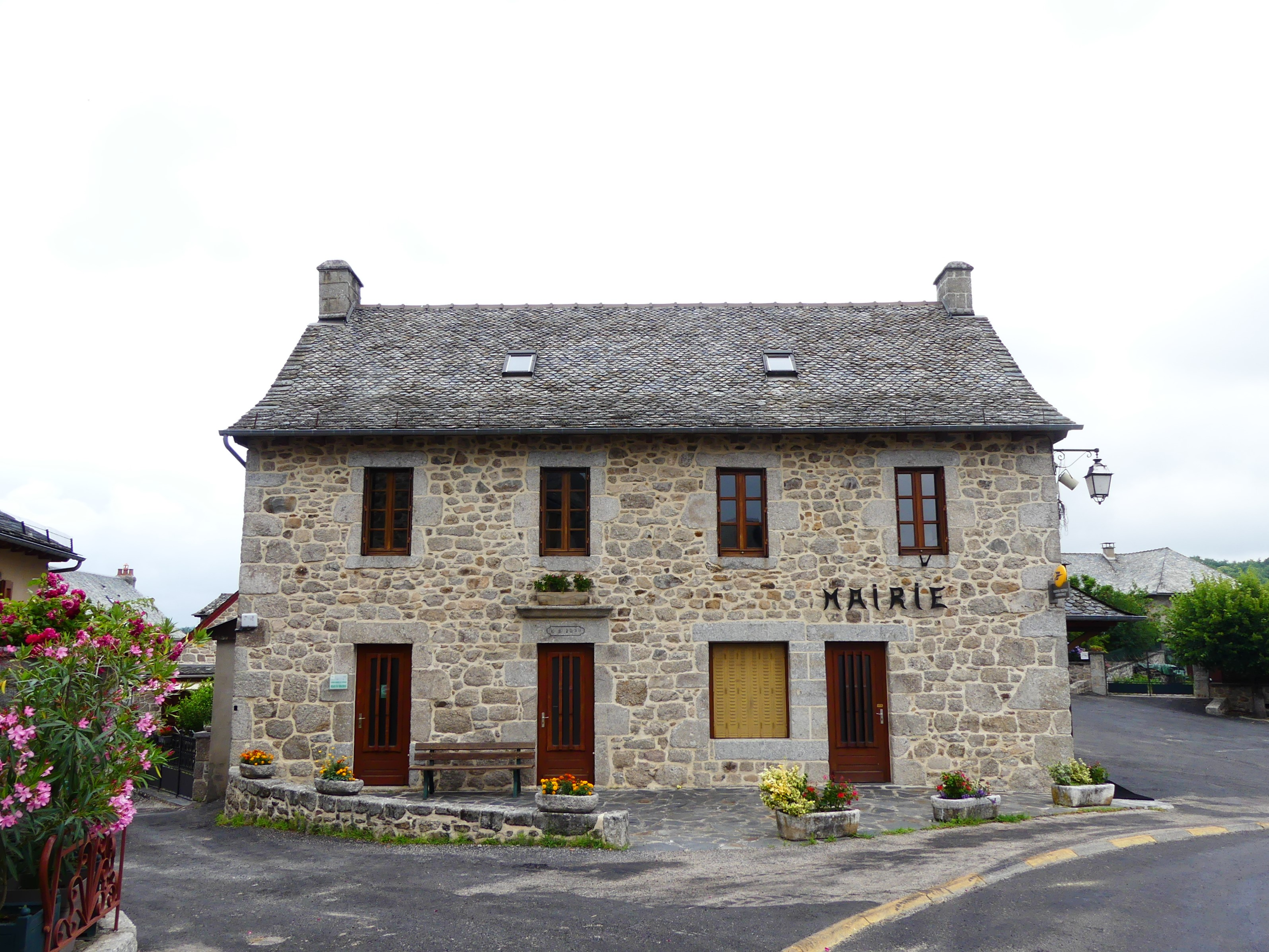 La mairie de Florentin-la-Capelle, Aveyron, France.